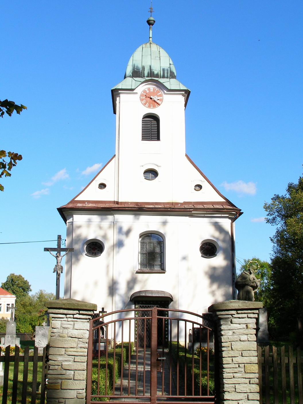 Kostel Archanděla Michaela (Liptál)